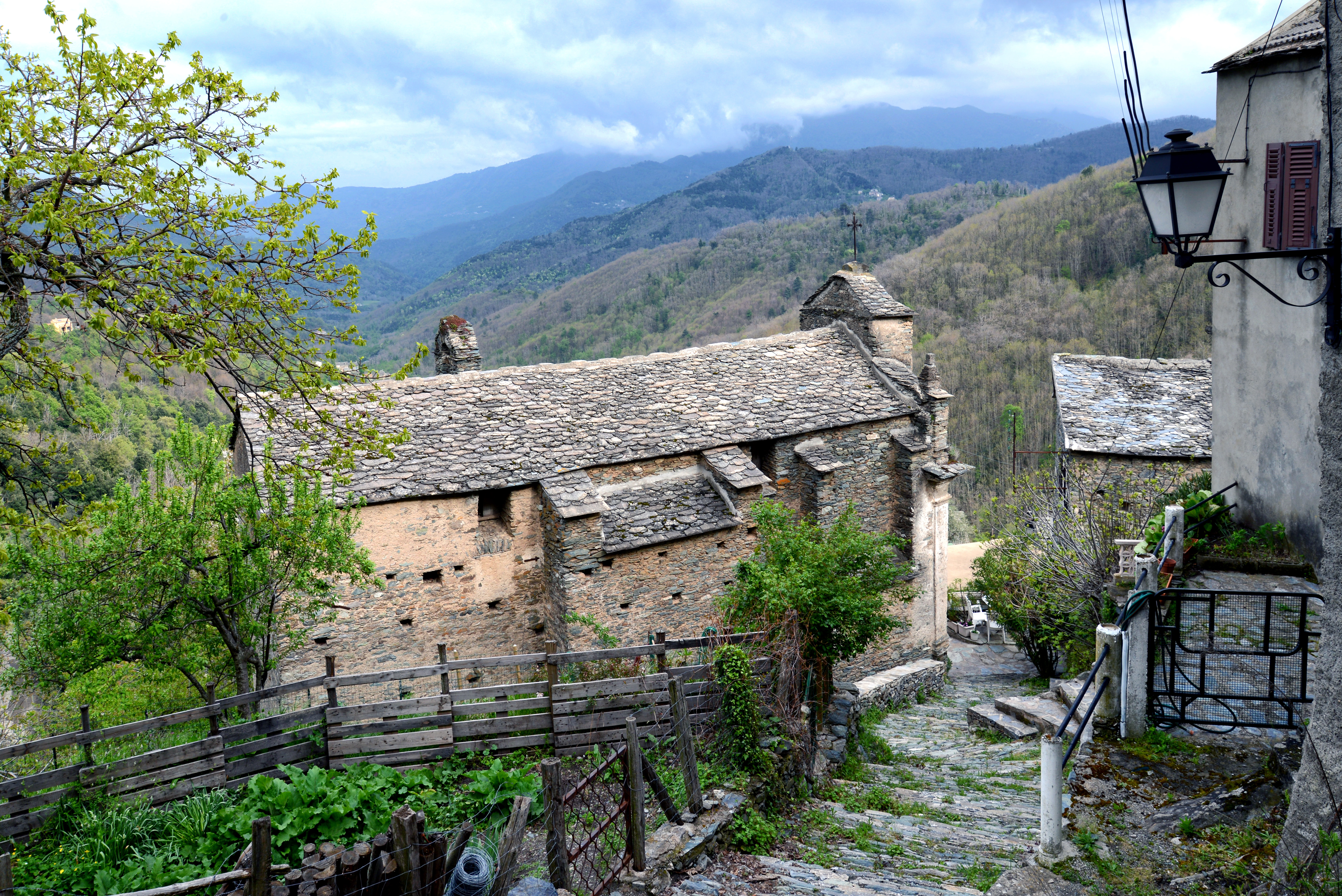 Poggio-Marinaccio, Castagniccia (Corse) - Vue du vallon du ruisseau de Piane et de Costero depuis la chapelle Saint-Antoine à Lutina